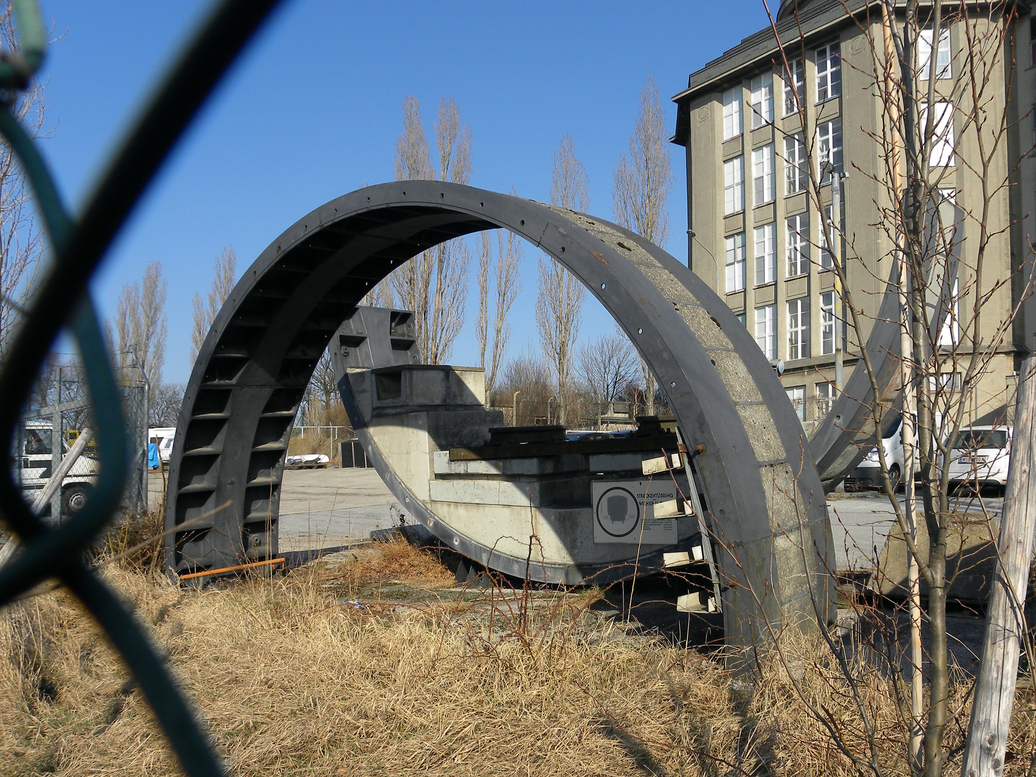 Das ehemalige Philips-Zeiss-Werk wird vom Bundesheer als Ausbildungswerkstätte für KFZ- und Panzertechnik der Heereslogistikschule verwendet. Das Streckentübbing stammt noch aus dem Besitz des Technischen Museums, welches hier während des Umbaus mehrere Schaustücke untergebracht hatte.